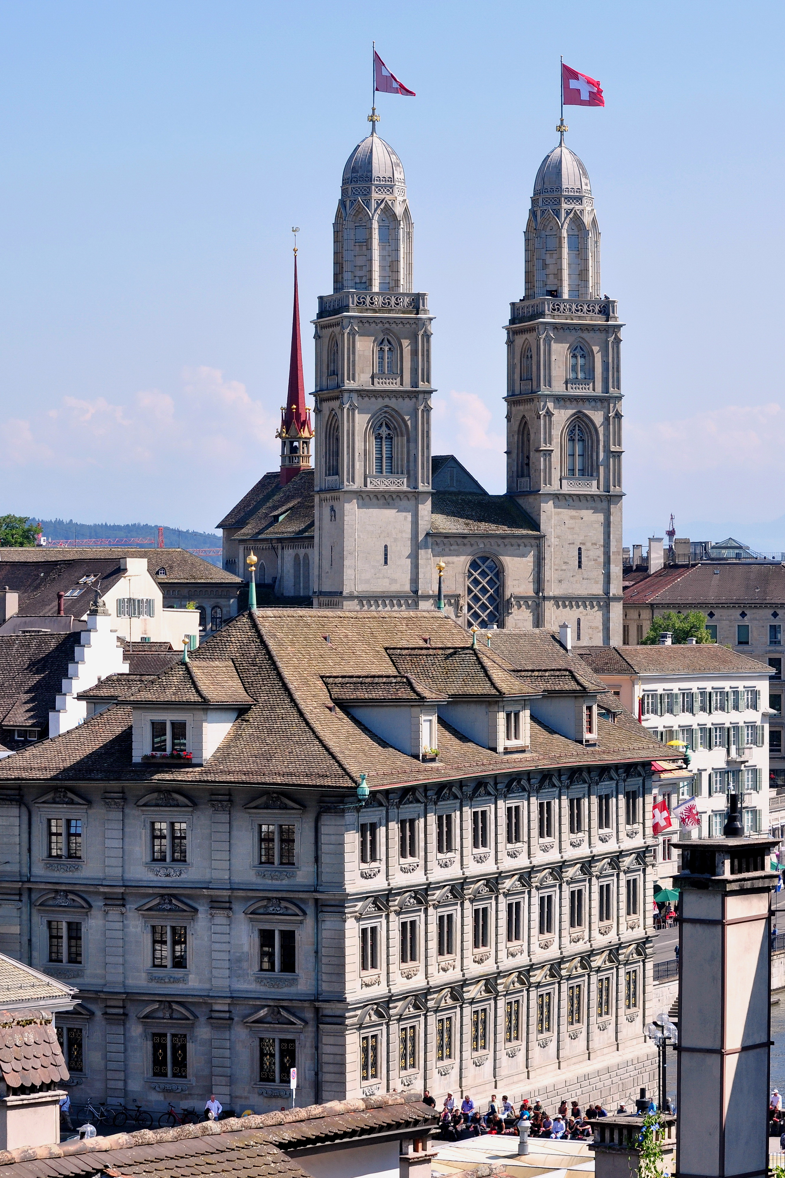 Grossmünster and Rathaus in Zürich (Switzerland) as seen from Lindenhof hill